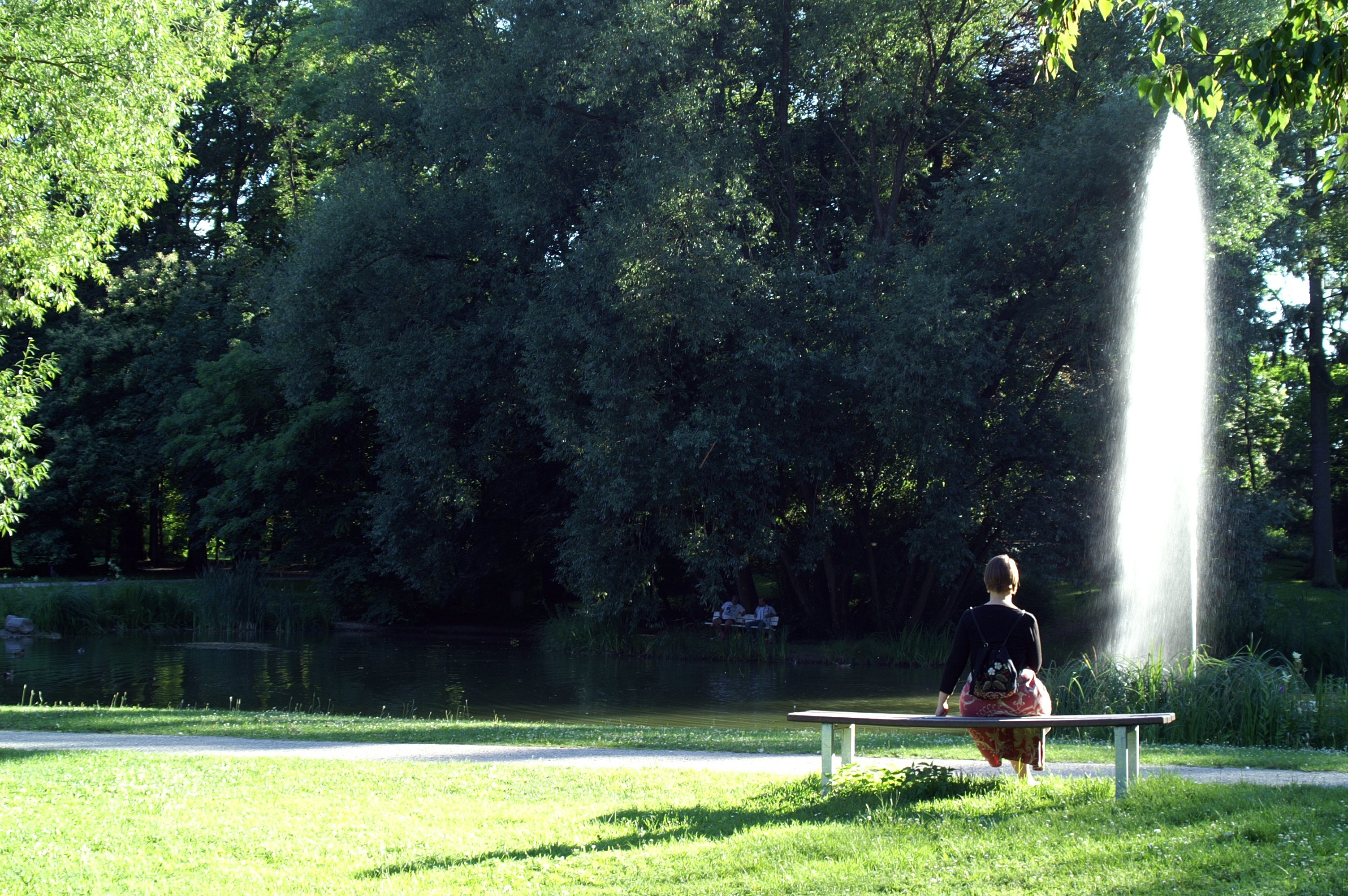 künstlich angelegter Stadtteich im Stadtpark, Regensburg